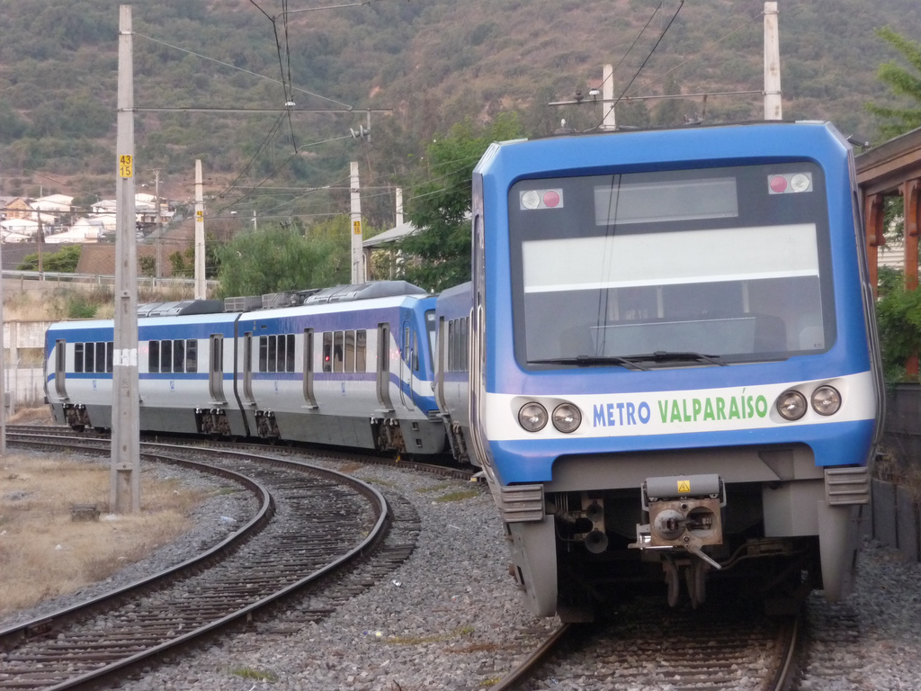 Clasica curva... unidad multiple